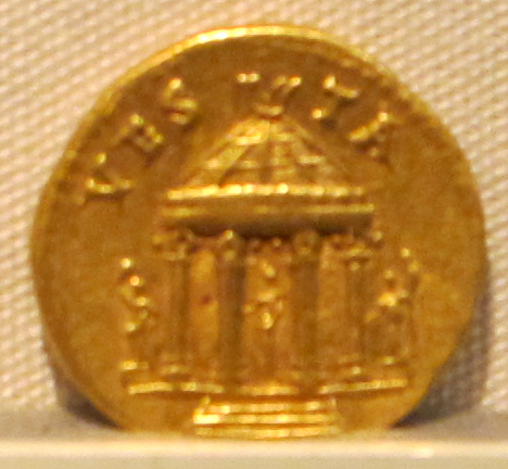 Palazzo Massimo alle Terme